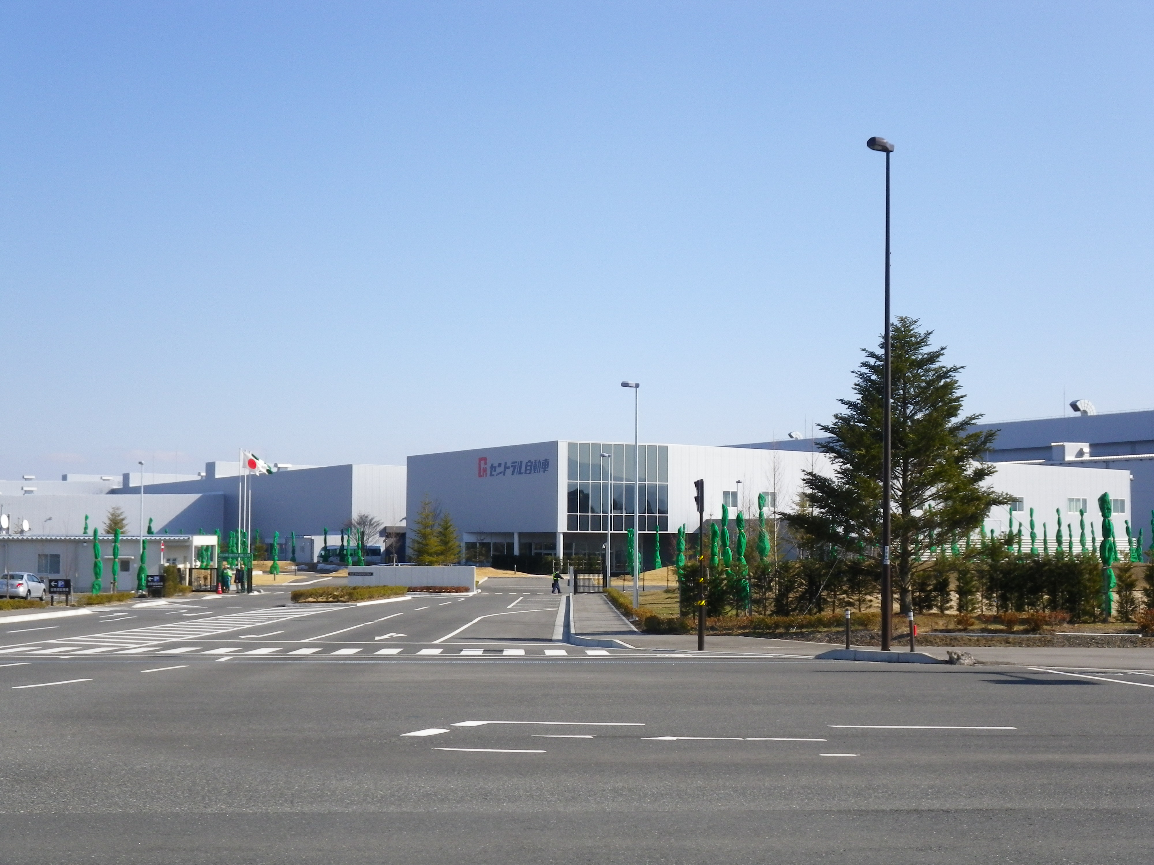 宮城県に移転したセントラル自動車の本社・工場